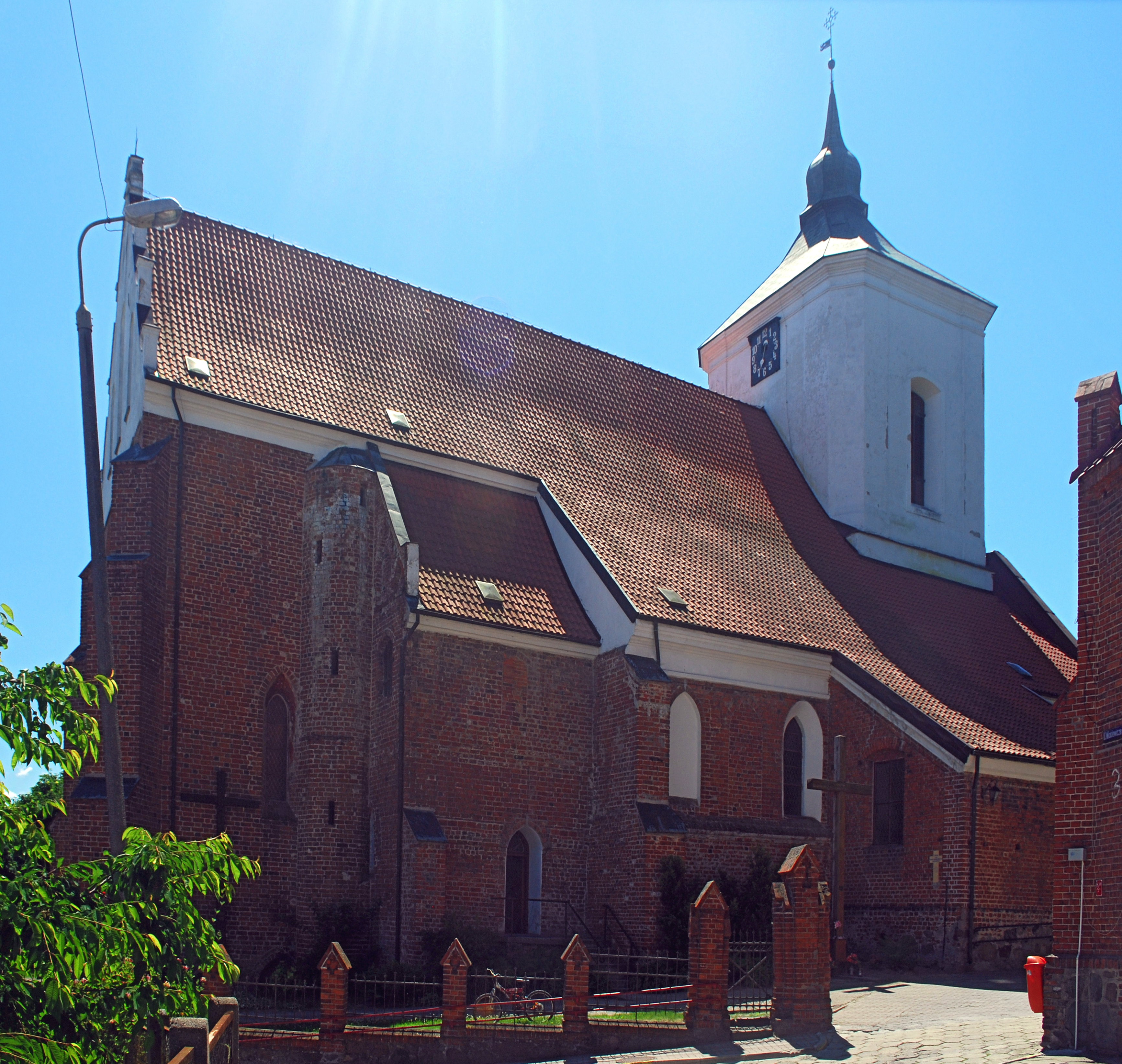 Dzierzgoń - rzymskokatolicki kościół parafialny p.w. Świętej Trójcy i św. Katarzyny, 1310-1320, 1730 (widok od tyłu).